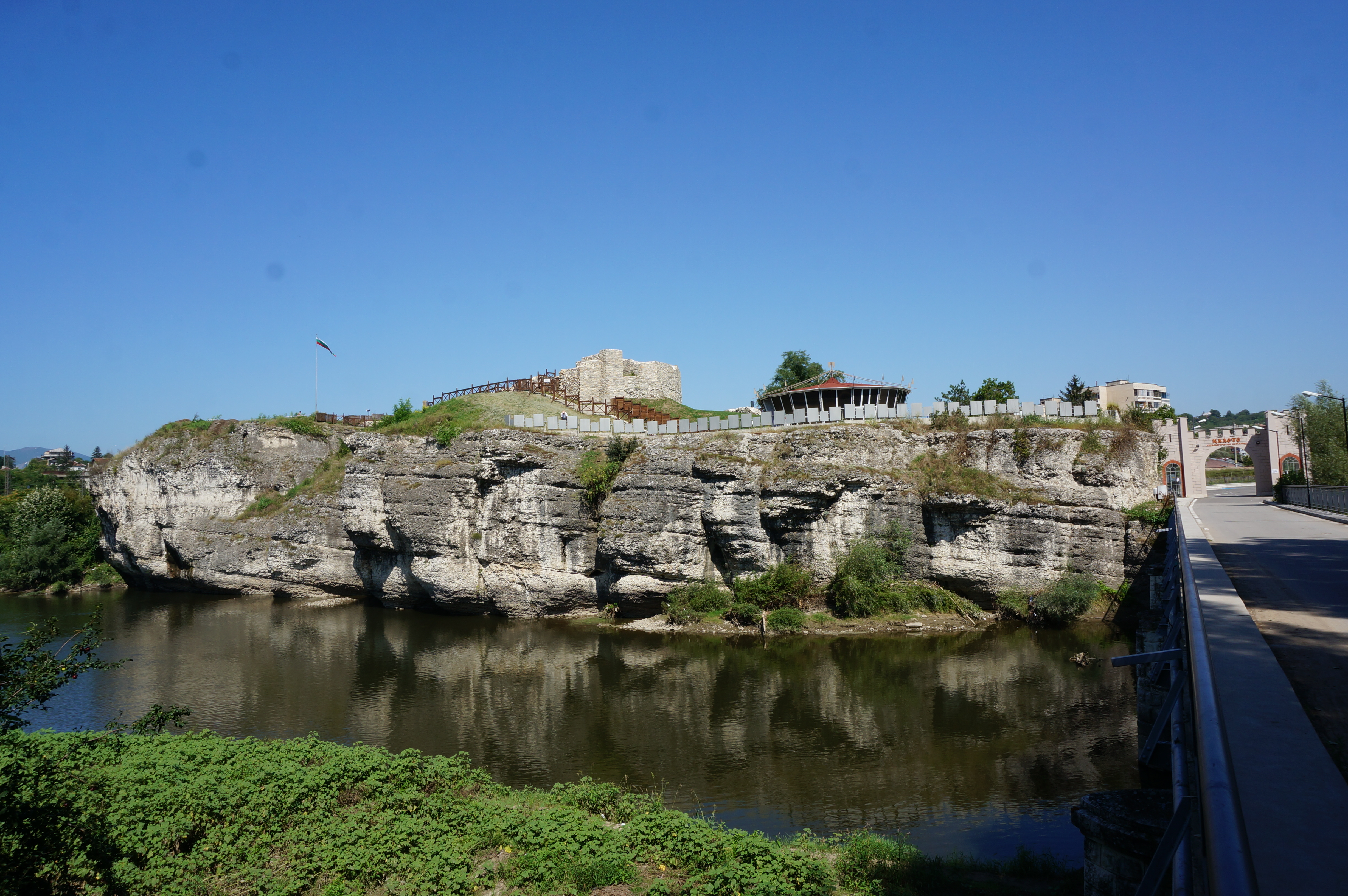 vue de la forteresse de Kaleto et des ses environs.